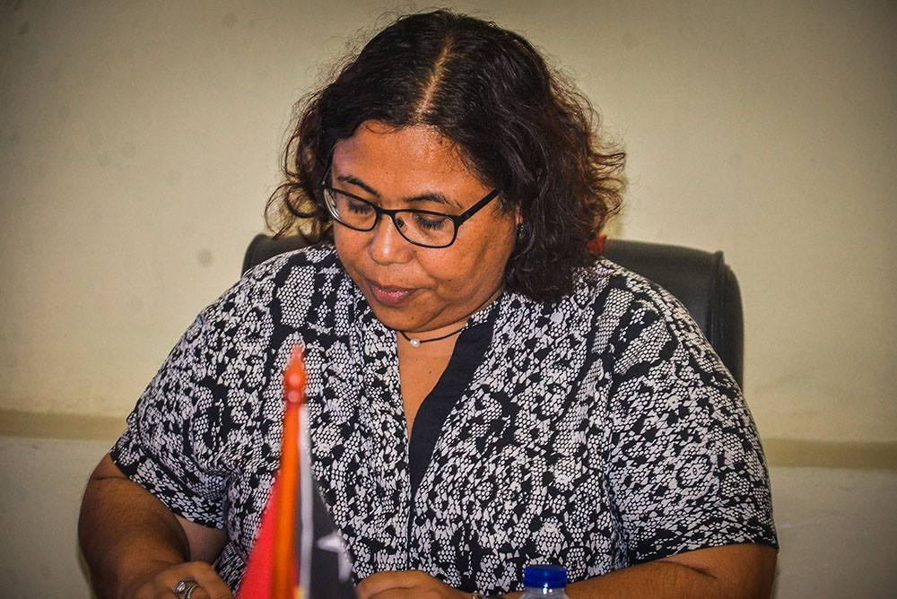 Lurdes Maria Bessa, Vize-Bildungsministerin